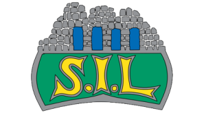 Logo